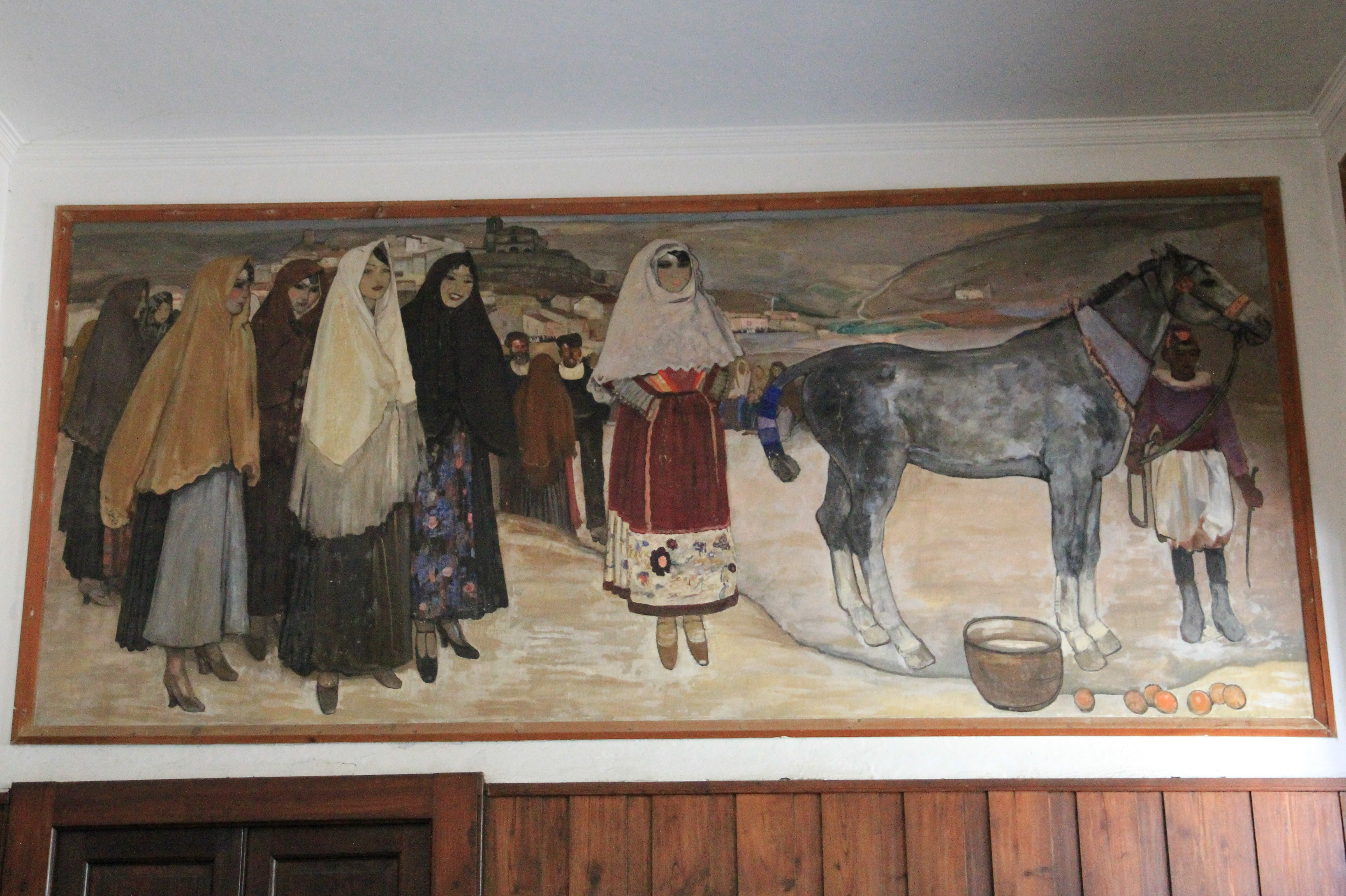 Tempio Pausania - Stazione ferroviaria